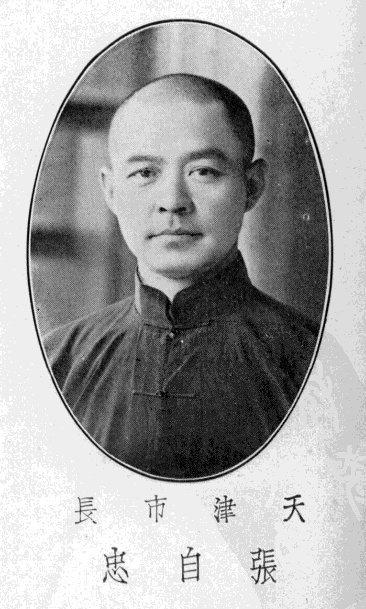 中文（台灣）: 張上將自忠